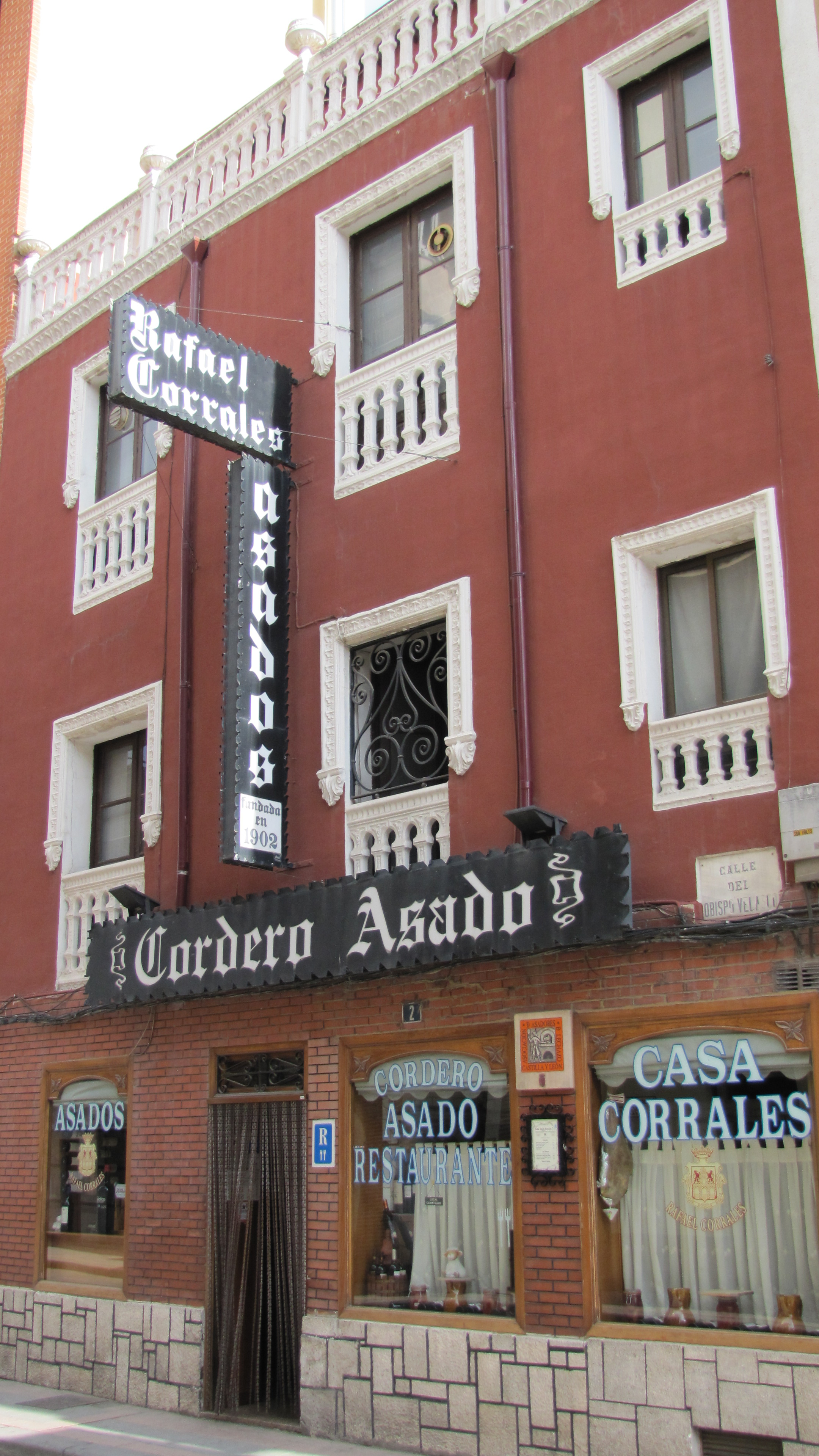 Fachada del Asador Rafael Corrales en Aranda de Duero (Burgos - España). Fundado en 1902.